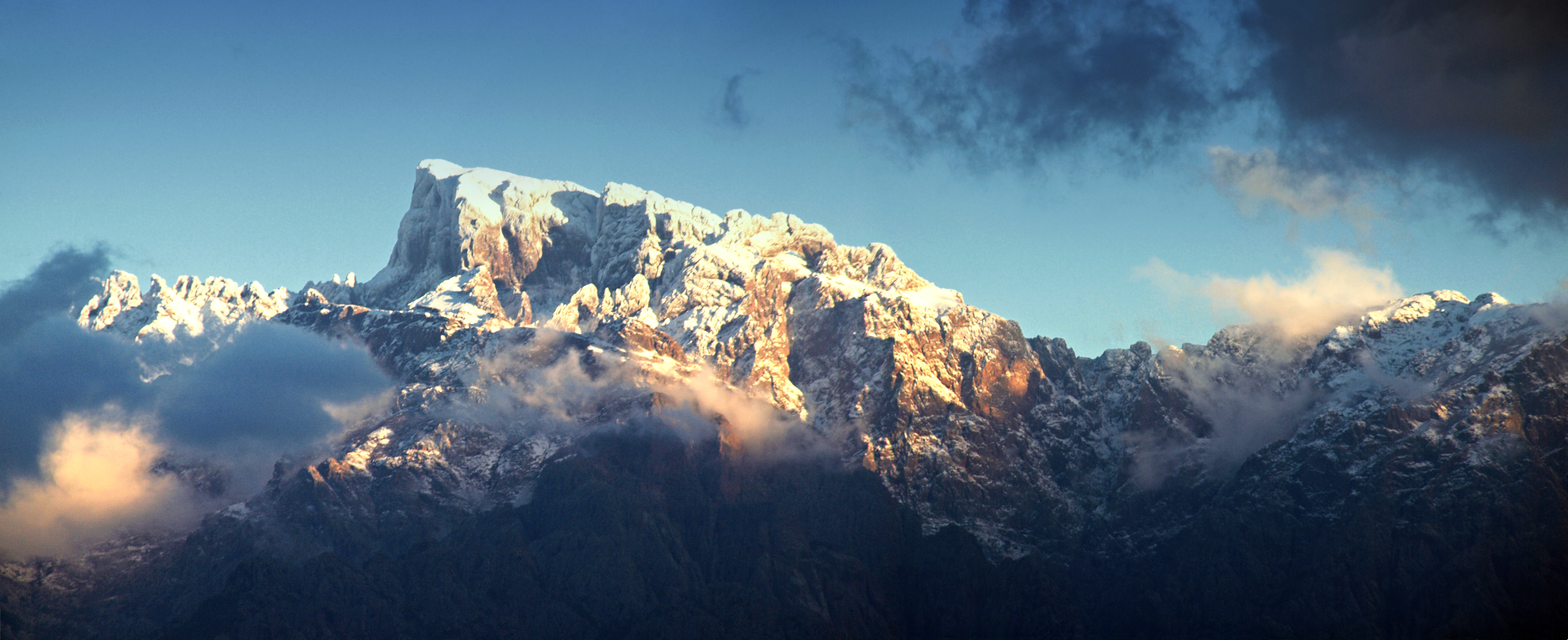 Galéria (Corsica) - Panorama de la Paglia Orba (2525 m - Albertacce) et du Capu Tafunatu le "sommet troué" (2335 m - Manso) à droite, d'une distance orthodromique d'environ 18 km.